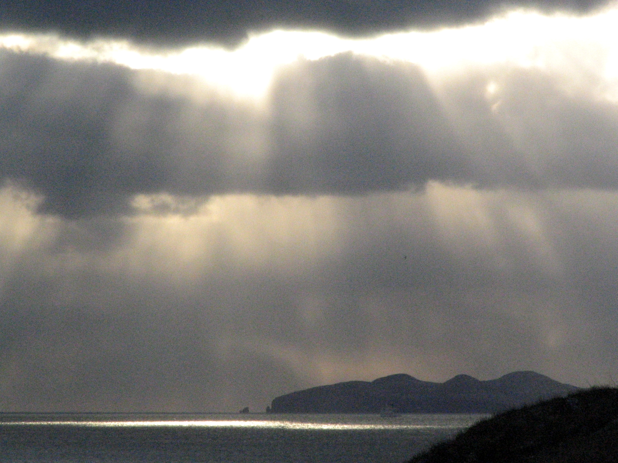 Pieds-de-vent avec l'Île d'Entrée en arrière-plan. Photo prise depuis l'île du Cap-aux-Meules.